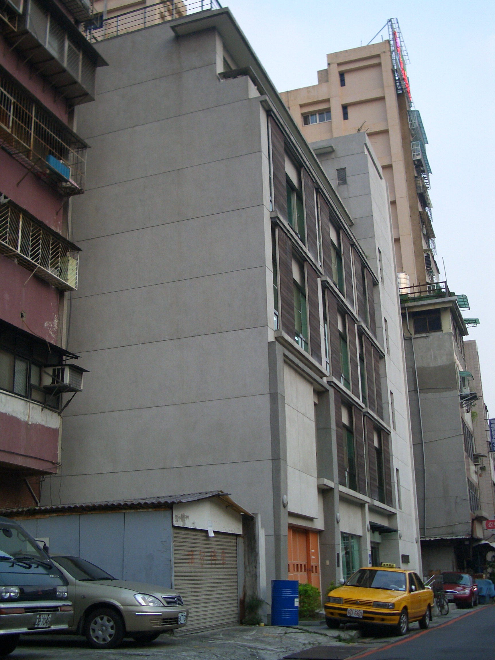 臺北市立圖書館恆安民眾閱覽室，位於臺北市中山區民權東路一段71巷19號。